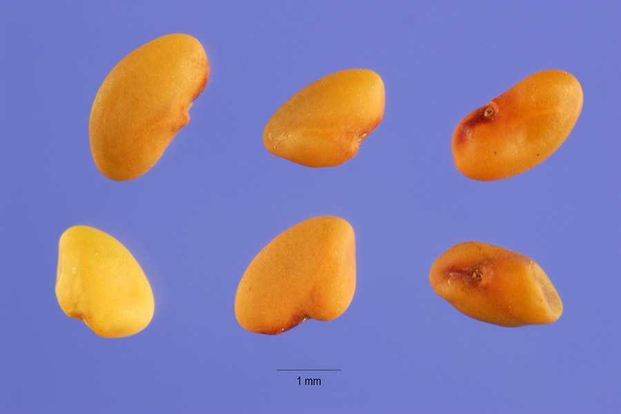 Medicago sativa L. - alfalfa